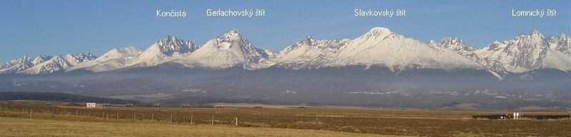 Pokus o doplneni nekolika popisek k souboru :Image:Panorama_High_Tatras_from_Poprad.jpg, puvodne to bylo GFDL. Puvodnim autorem fotky je :sk:Redaktor:Kristo.